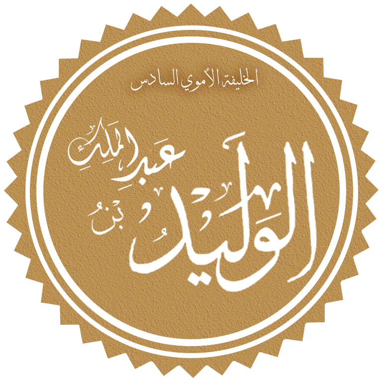 الوليد بن عبد الملك الخليفة الأموي السادس